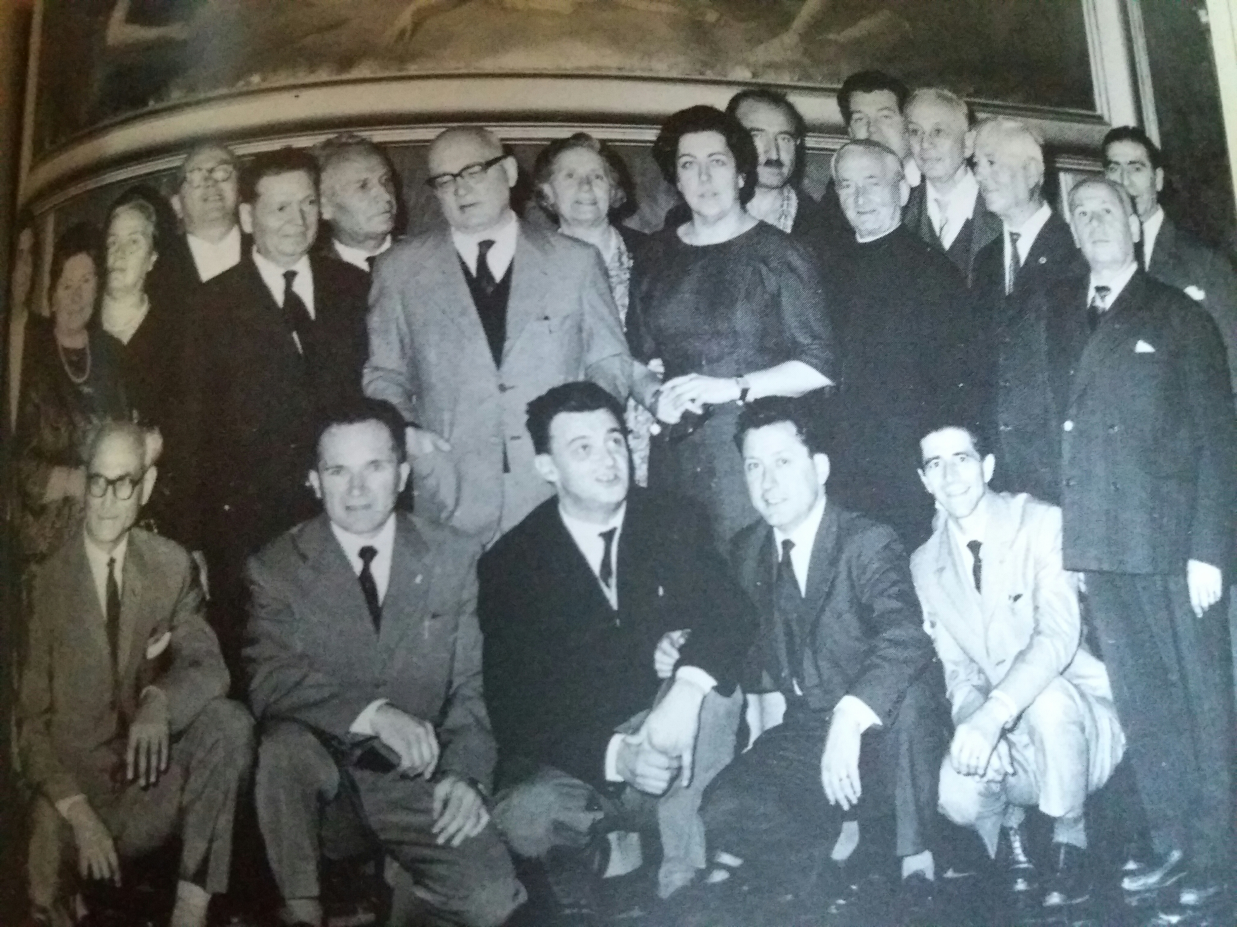 Piemontèis: Grup ëd poeta dialetaj. Pettiti Secondo a l'é 'l ters an pé da drita. A-i son ëdcò Pinin Pacòt, Celestina Costa, Armando Mottura, Renato Bertolotto, Antonio Bodrero, Gustavo Buratti, Francesco Origlia, Carlo Comino, Salvatore Viviani, Camillo Brero e autri dla "Companìa dij Brandé".